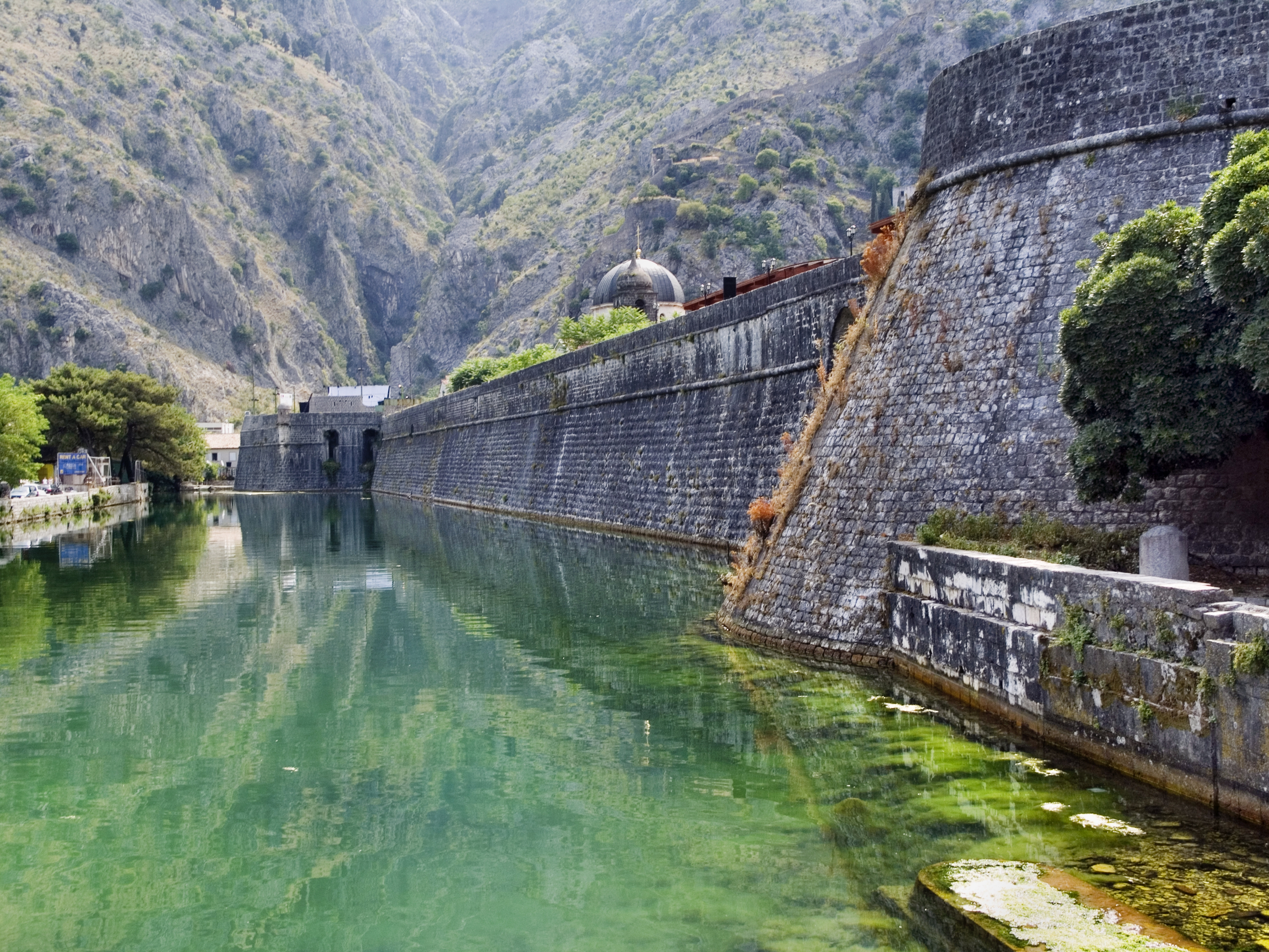 Черногория, Котор. Крепостные стены старого города